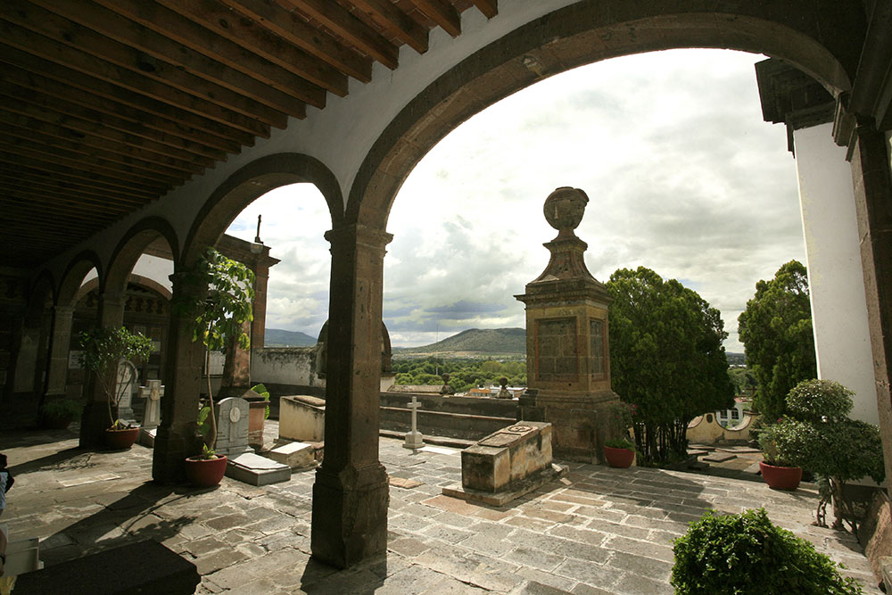 Vista General Museo de la Muerte